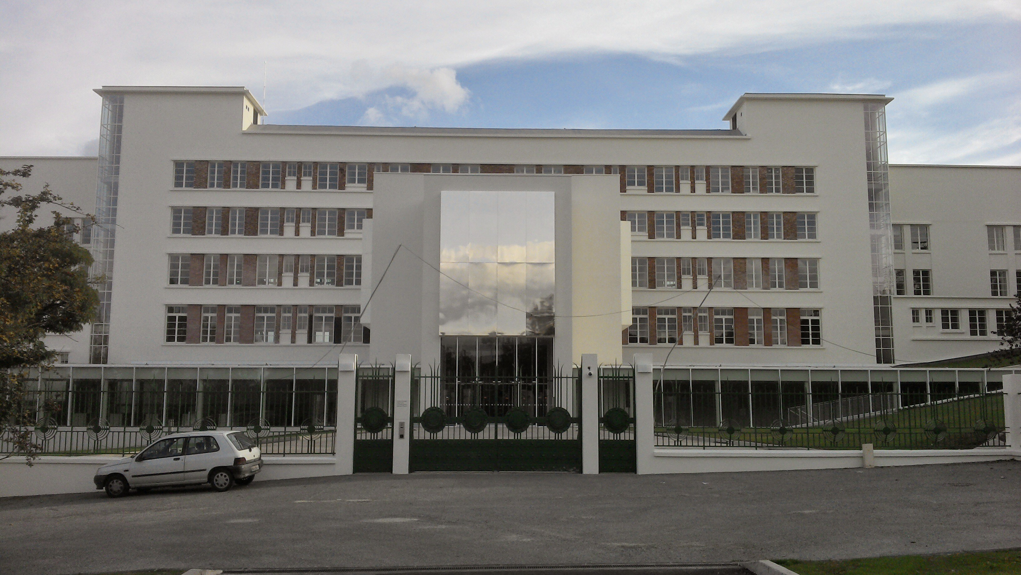 ENSACF - Ecole Nationale Supérieure d'Architecture de Clermont-Ferrand